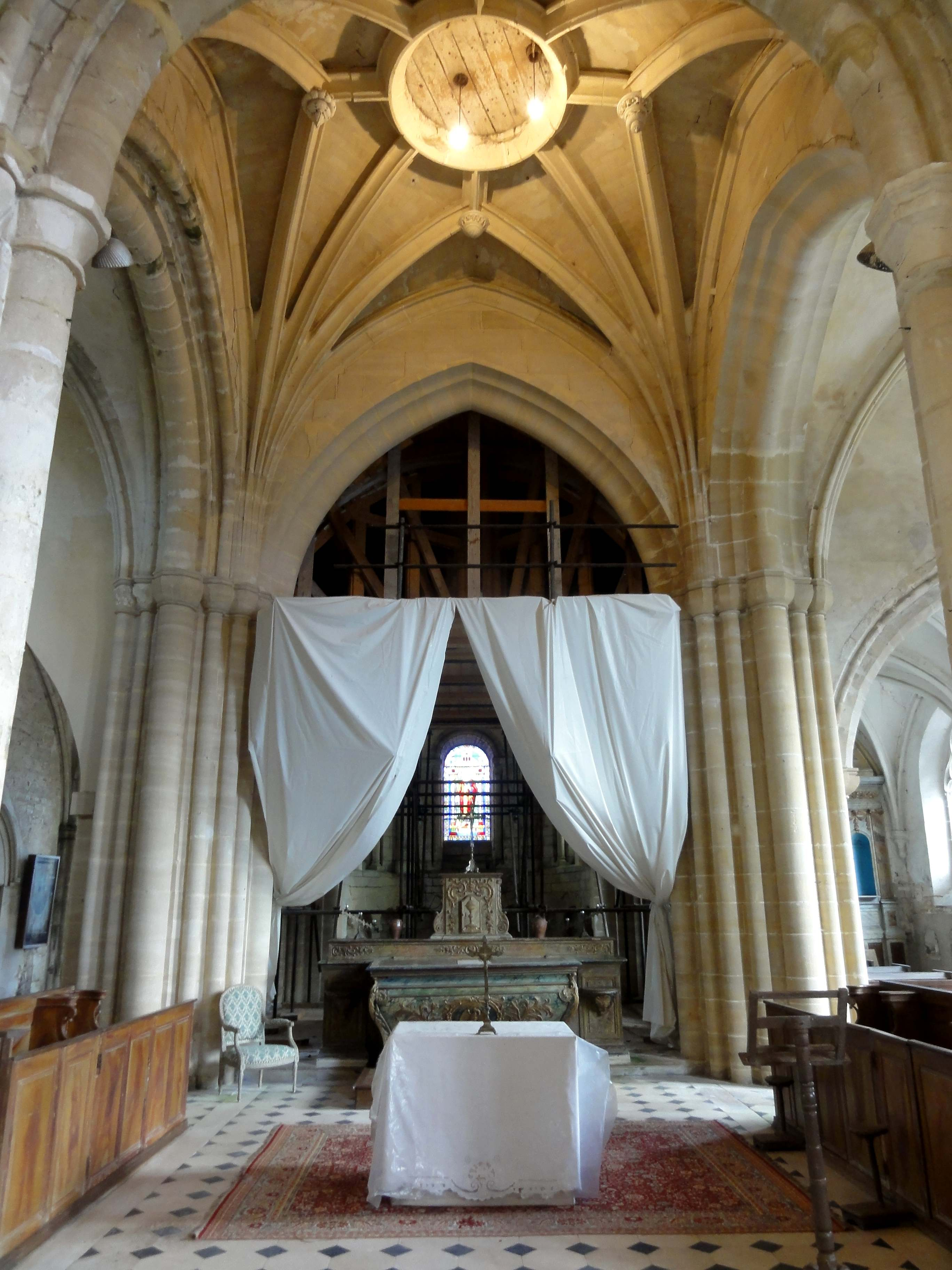 Intérieur de l'église - voir le titre du fichier.